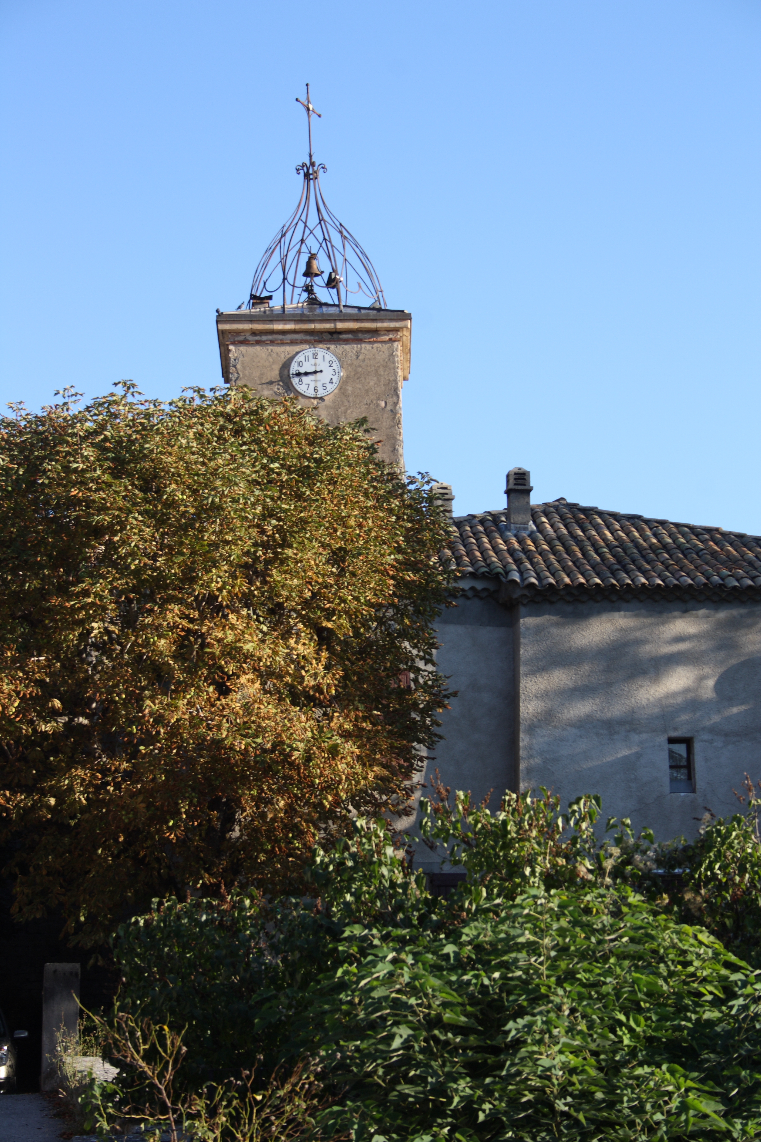 Marcoux